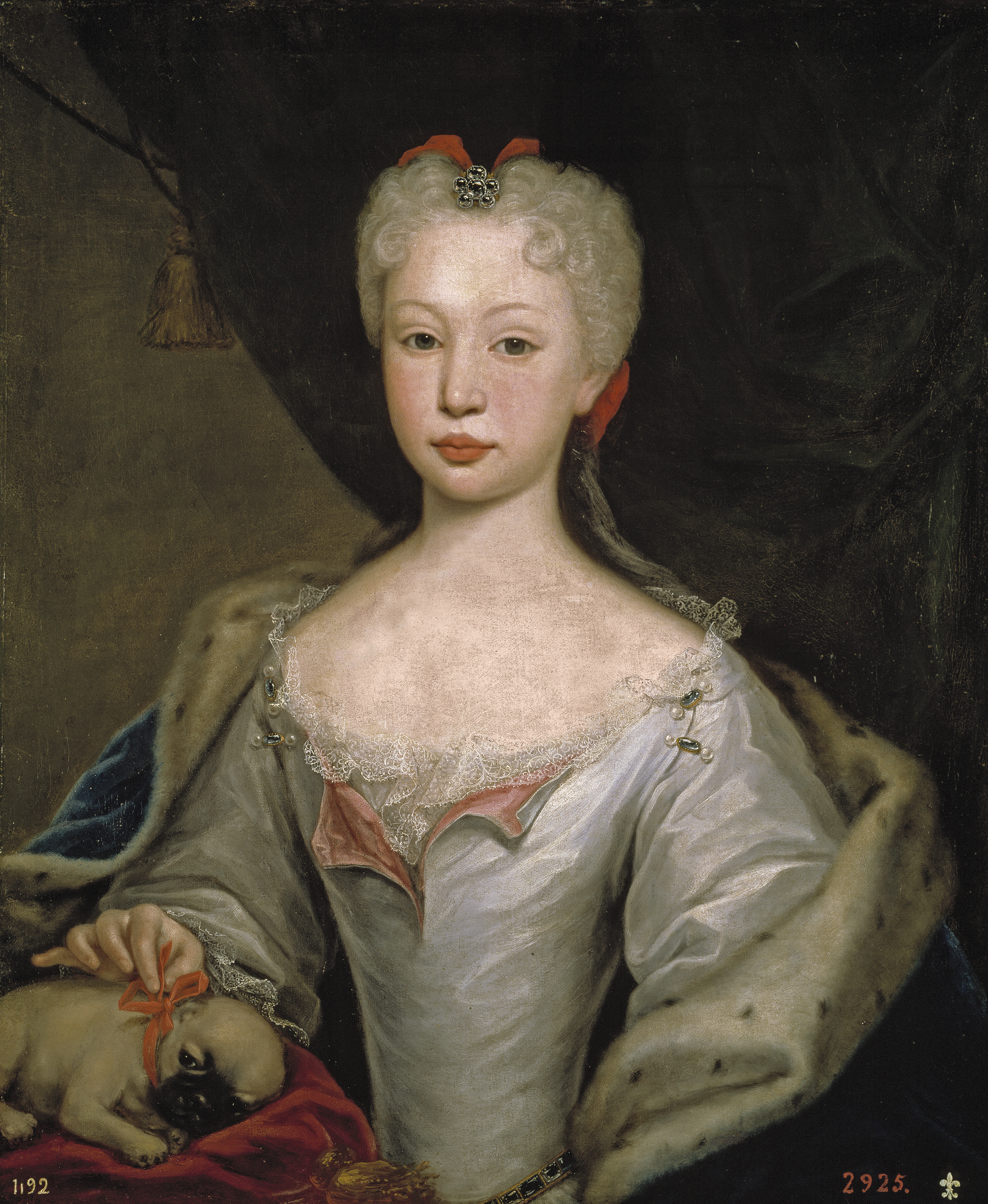 Retrato de la reina Bárbara de Braganza (1711-1758), que fue hija del rey Juan V de Portugal y de la reina María Ana de Austria.